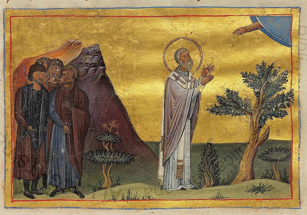 Свт. Григорий, еп. Акрагатский. Миниатюра из Минология Василия II. 976-1025 гг. (Vat. gr. 1613. Fol. 203)